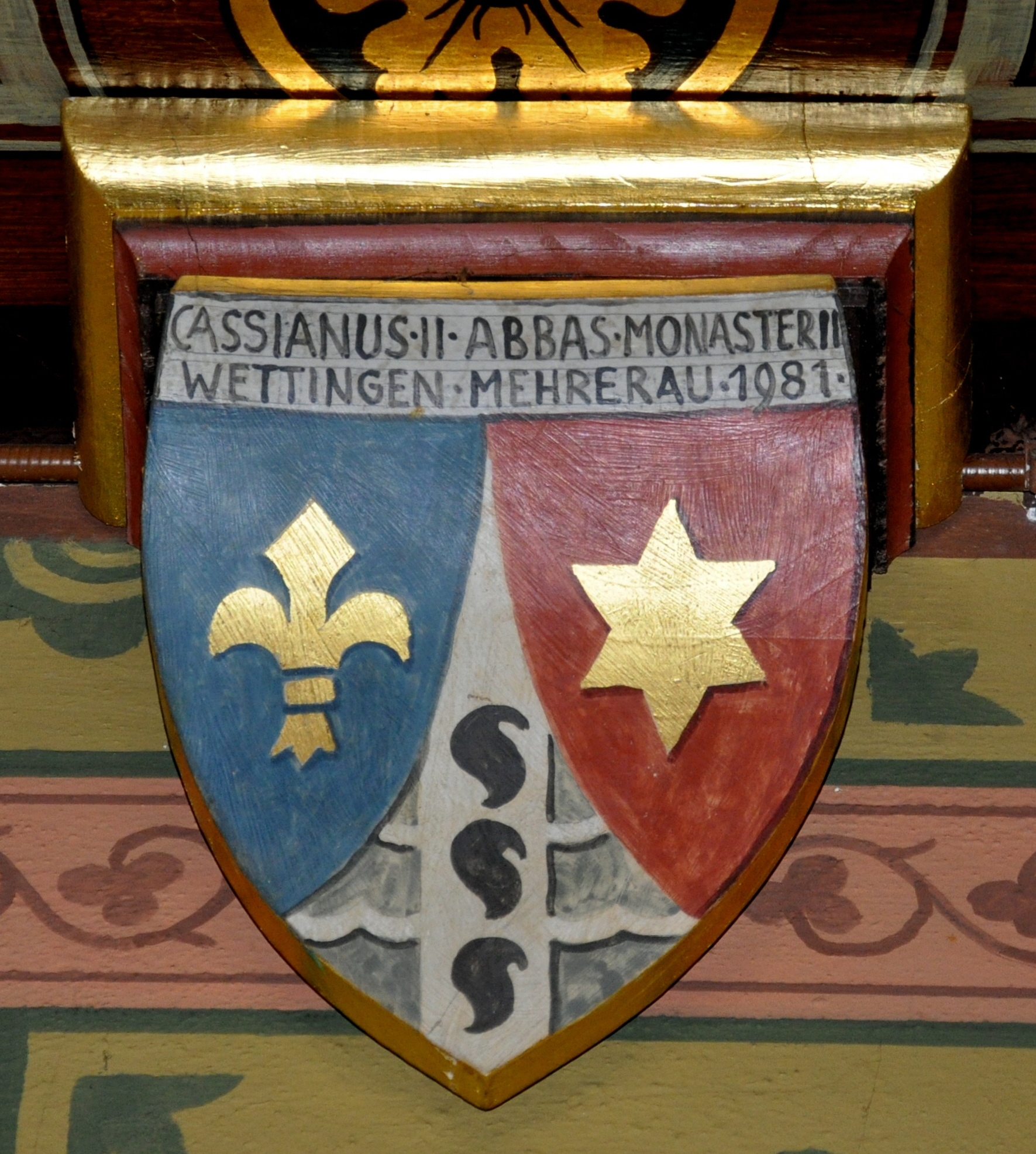 Kloster Mehrerau, Bregenz, Vorarlberg; Collegiumskapelle; Wappen des Abts Cassianus II. (Kassian Lauterer OCist), Abt der Territorialabtei Wettingen-Mehrerau, 1981